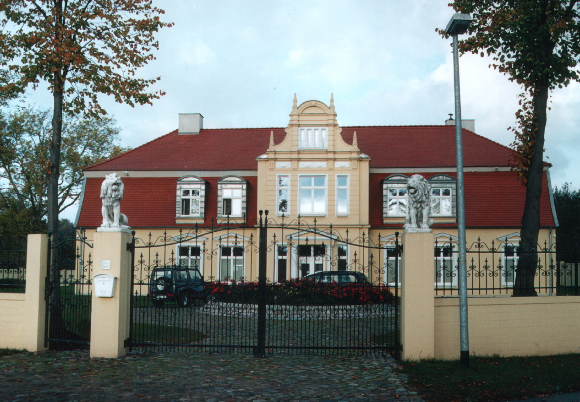 Vormaliges Dolgener Herrenhaus der Familie Leopold von Plessen nach der Sanierung durch den begünstigten Bieter der Treuhandversteigerung (aus Borken) Datum: 19.10.2003 Urheber: Michael Pfeiffer (Enkel des Leopold v. Plessen) Quelle: Privates Fotoalbum der eigenen Familie